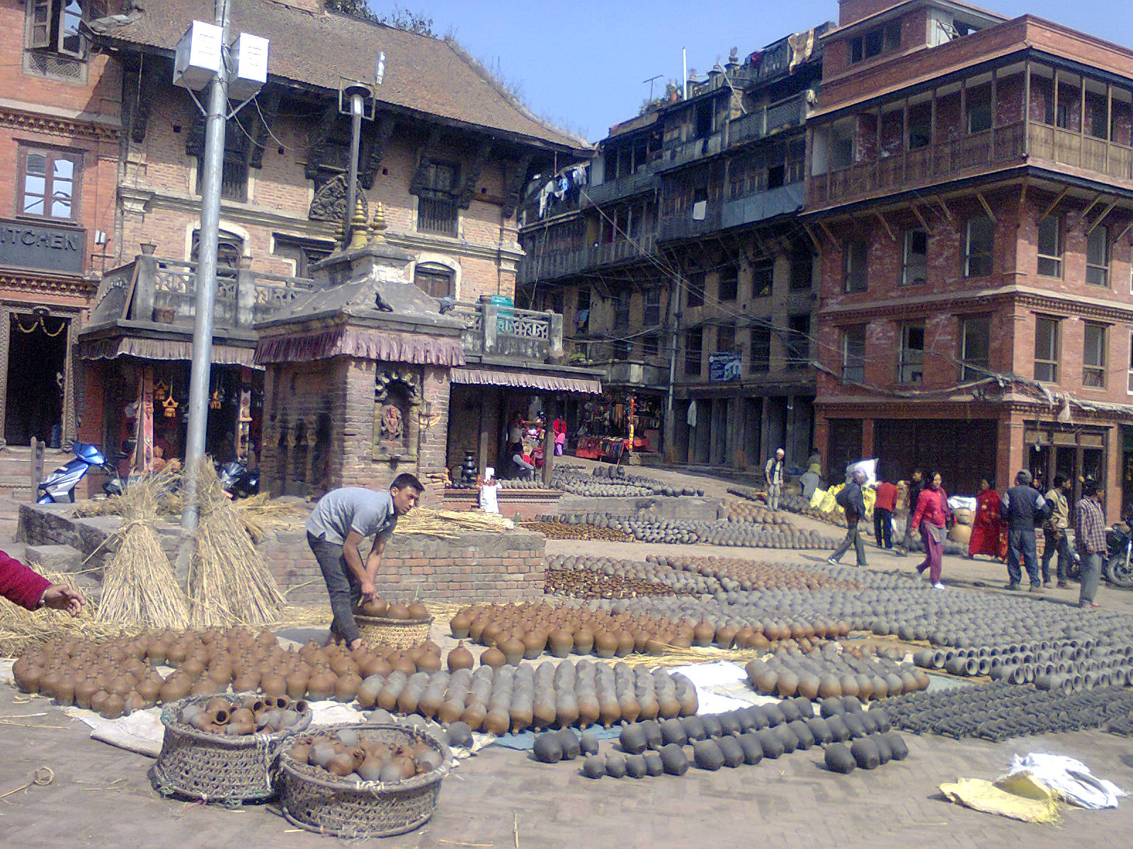 नेपाली: तालाको भक्तपुर (Pottery Square)